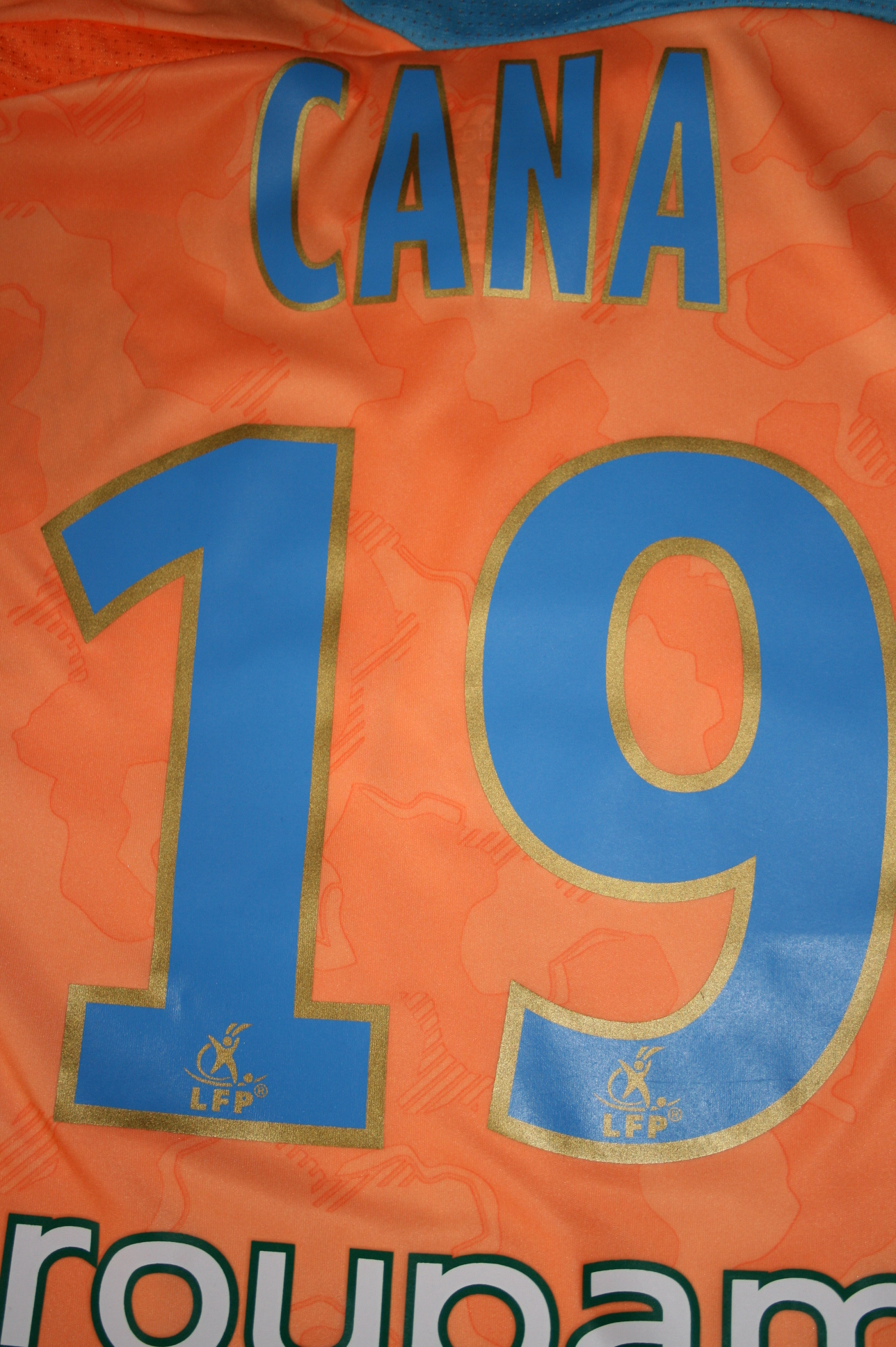 Olympique de Marseille - Footbal Shirt - #19 Lorik Cana 2007-2008